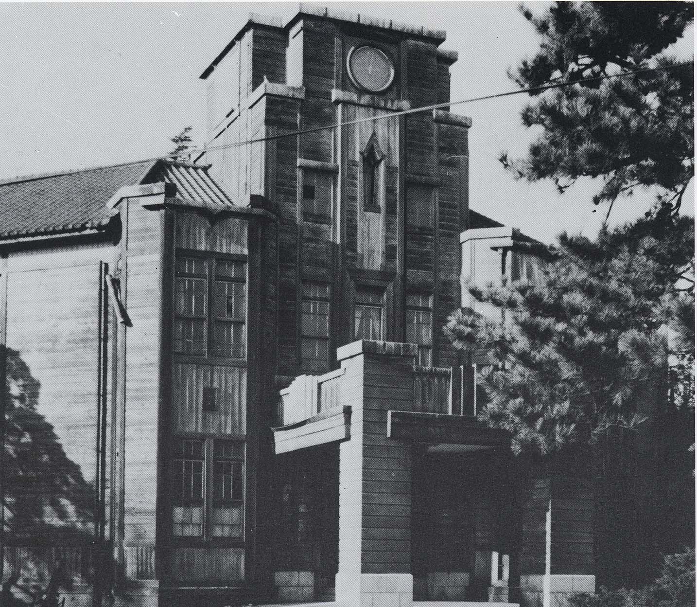 千葉医科大学本館（千葉大学医学部の前身）